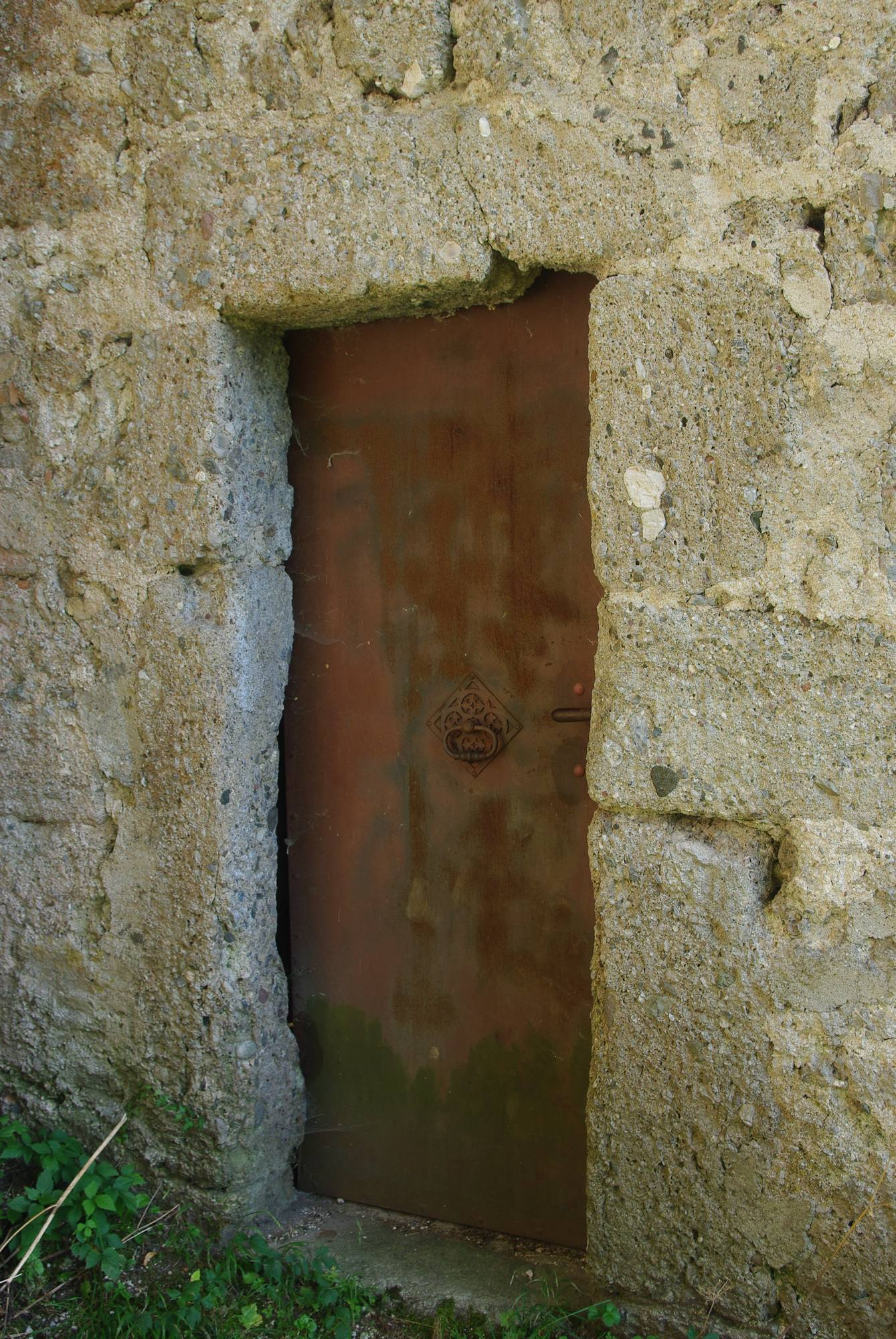 Pulverturm, Teil der ehemaligen Stadtbefestigung von Bad ReichenhallThis is a photograph of an architectural monument.